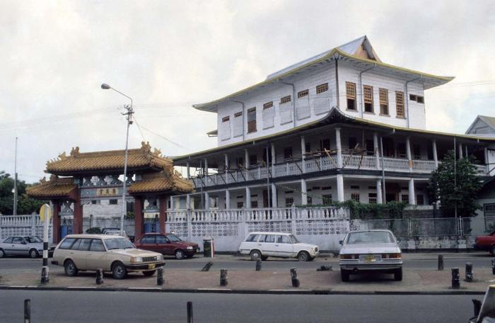 Dia. Dr. Sophie Redmondstraat, gebouw van de Chinese sociëteit